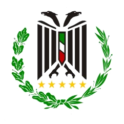 Escudo del PDMU